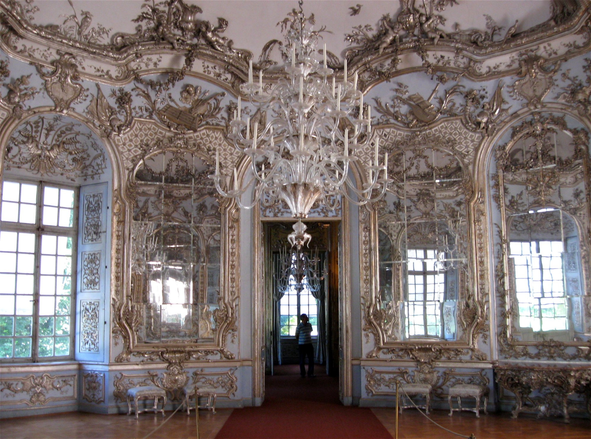 Amalienburg im Schlosspark Nymphenburg (München): Spiegelsaal